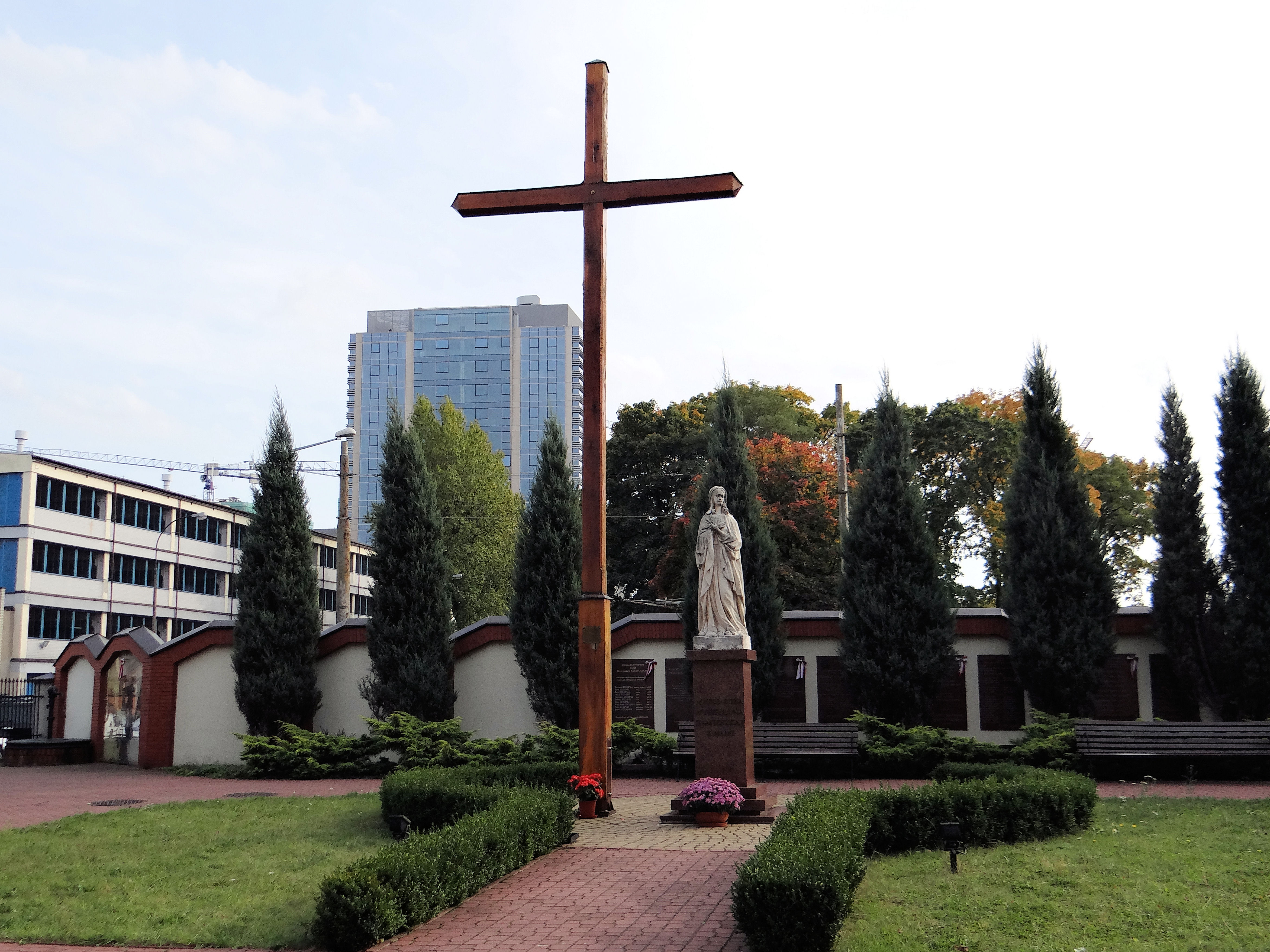 Kościół pod wezwaniem św Klemensa Hofbauera w Warszawie na Woli, przy ul. Karolkowej 49 - krzyż misyjny oraz zabytkowa figurka MB Wysiedlonej na skwerze pamięci na dziedzińcu światynnym